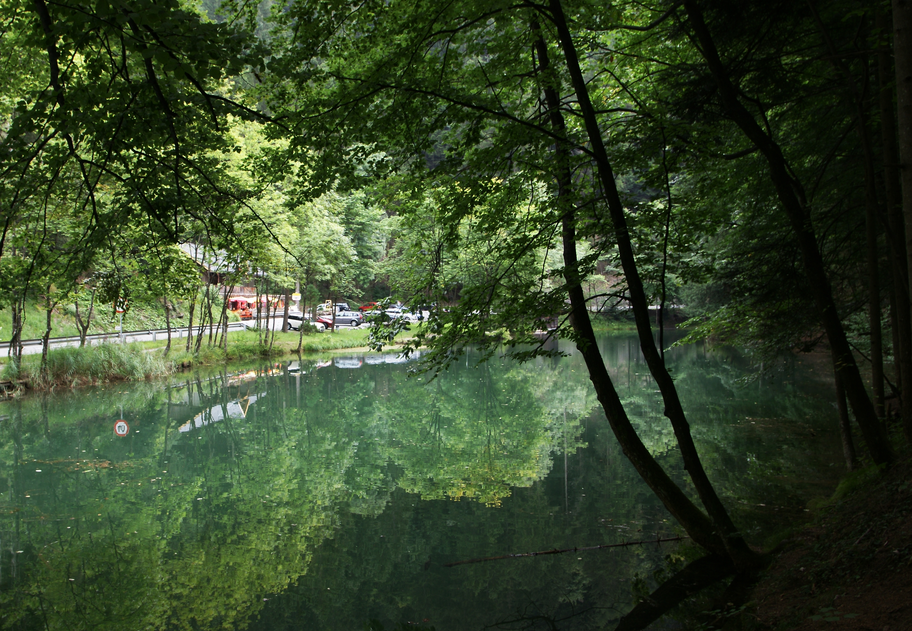 Der Schwarzer See liegt zwischen den Ortschaften Göfis und Satteins im Bundesland Vorarlberg.